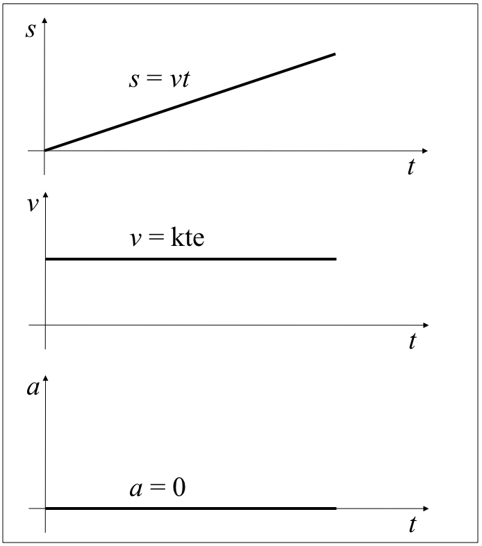 Higidura zuzen uniformeko desplazamendu, abiadura eta azelerazioaren eboluzio denboralen adierazpen grafikoa.